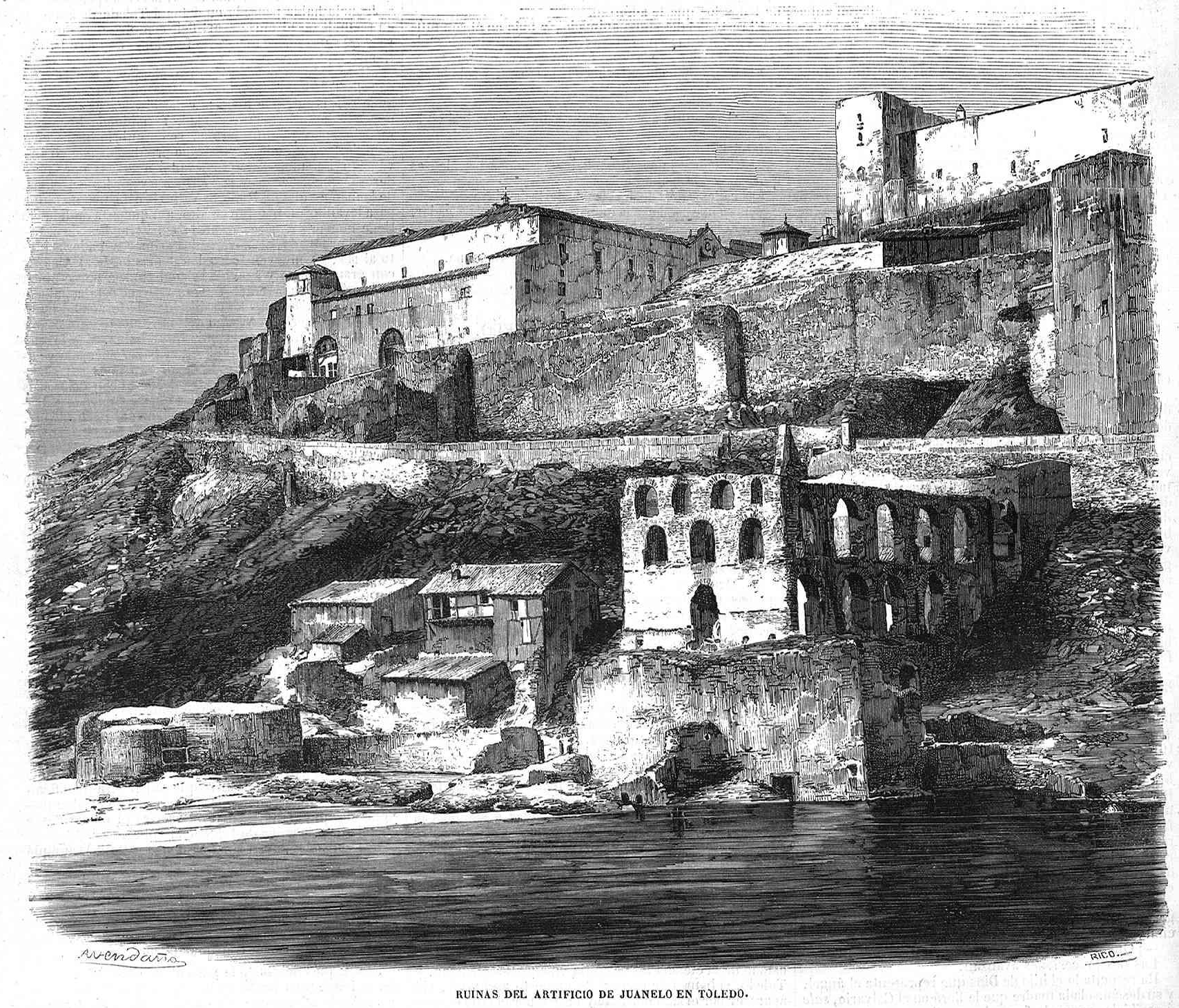 Ruinas del artificio de Juanelo en Toledo, en la revista española El Museo Universal.